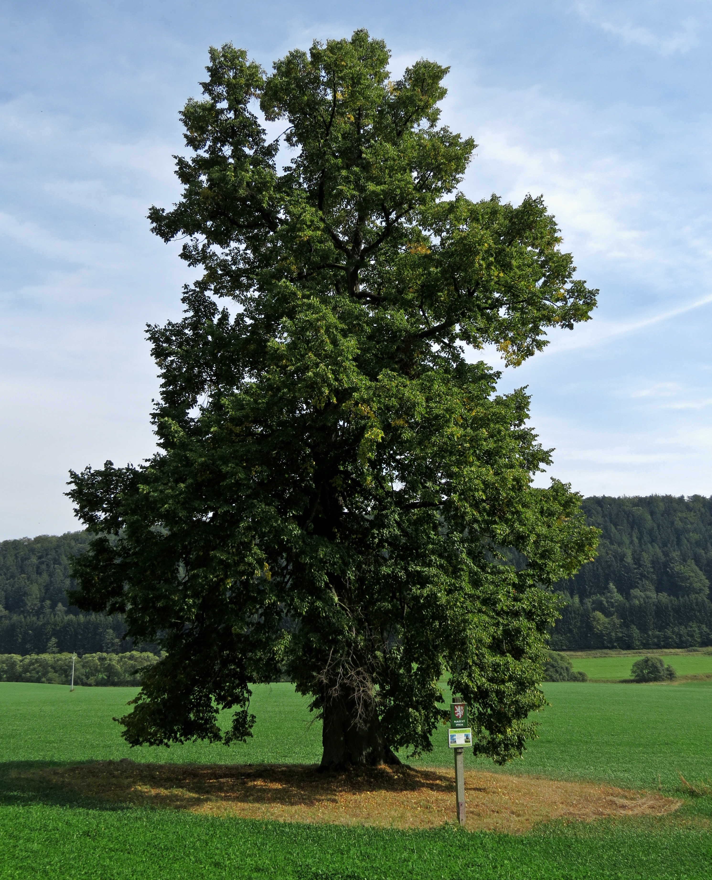 Památná lípa na louce u křižovatky na Krčmově nad Horním Adršpachem